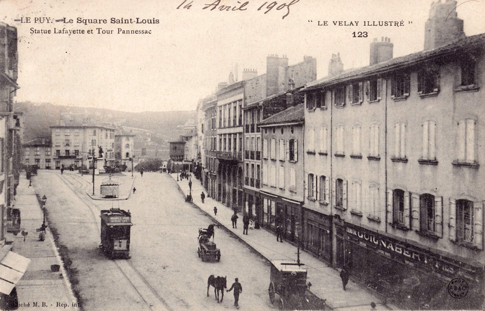 Carte postale ancienne éditée par ABC, cliché MB n°123, collection Le Velay illustré : LE PUY-EN-VELAY - Le Square Saint-Louis - Statue Lafayelle et Tour Pannessac